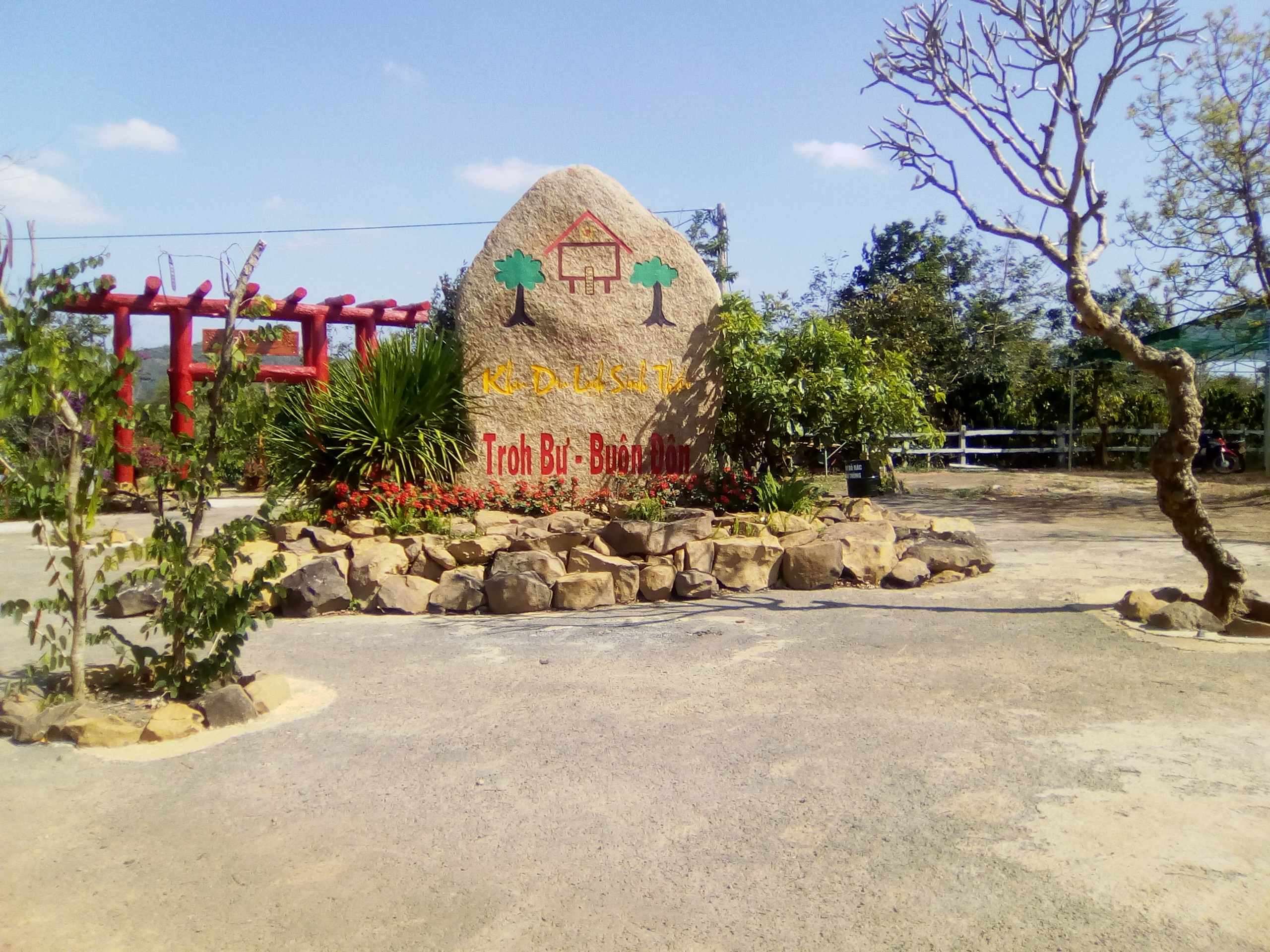 cổng vào